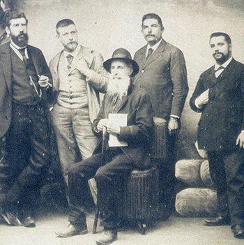 Pepito Hermida y Castro, sentado.